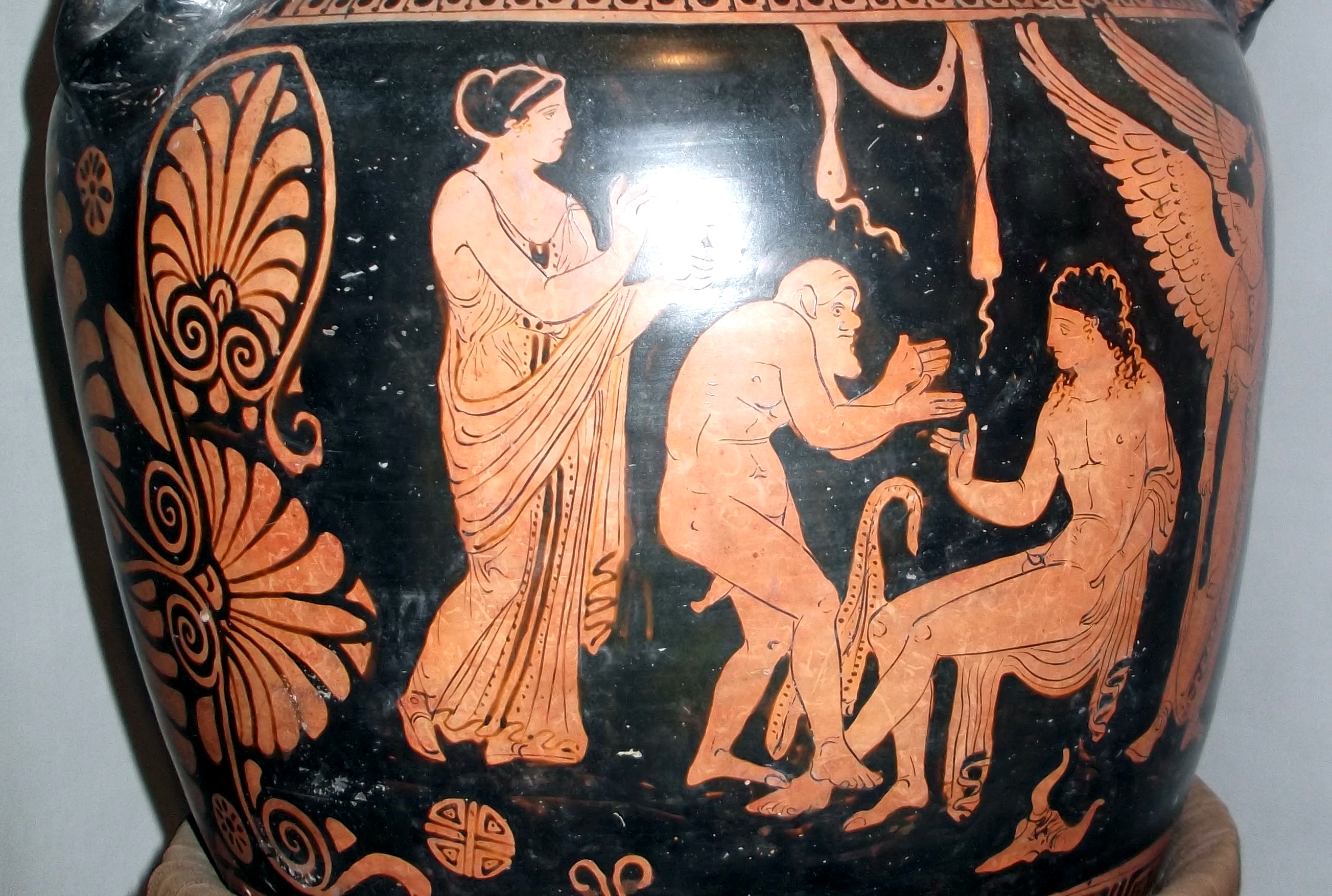 Cratere apulo del Museo Jatta di Ruvo di Puglia